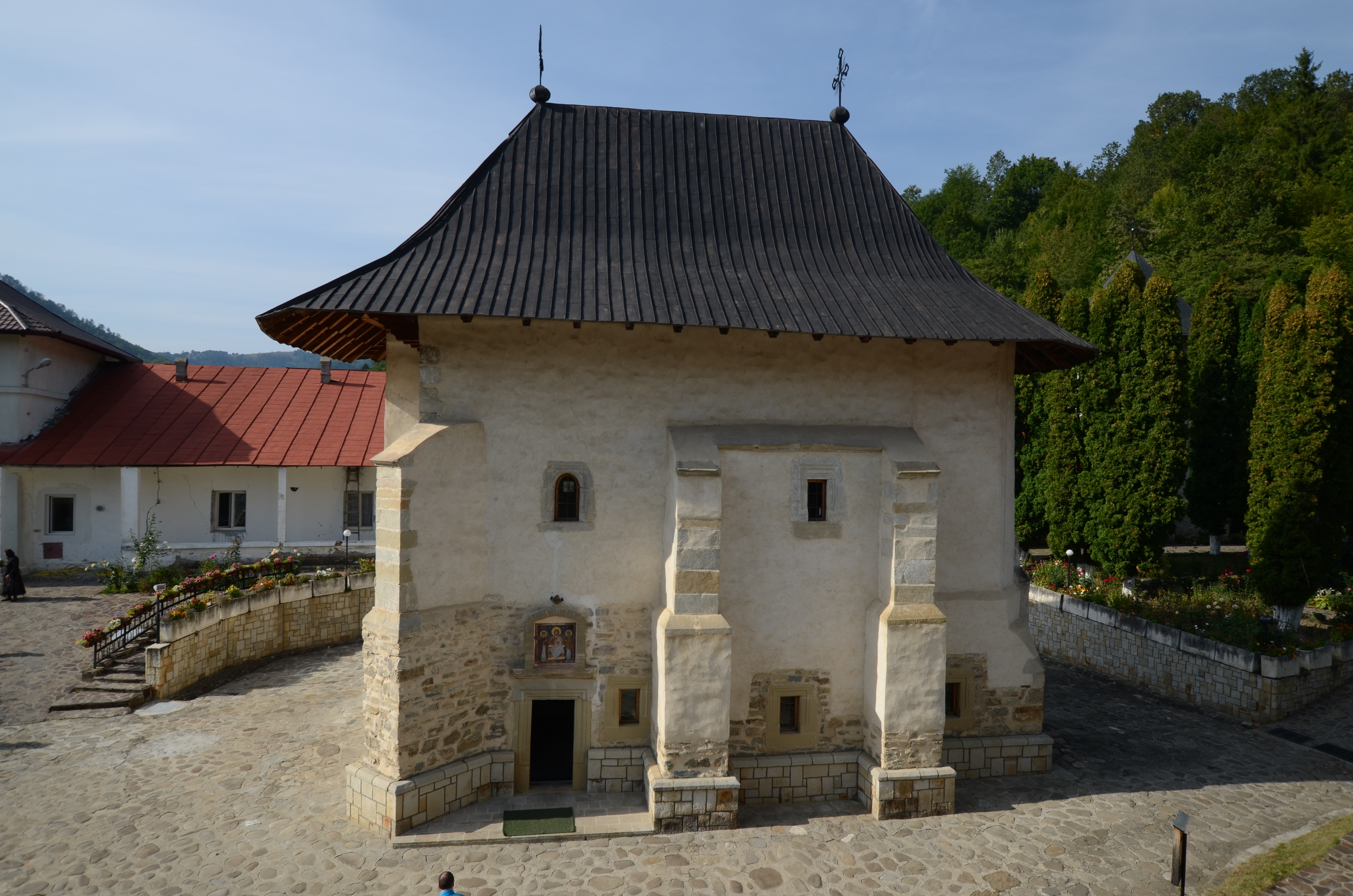 Mănăstirea Pângărați, Neamț - Biserica "Sf. Dumitru" 01